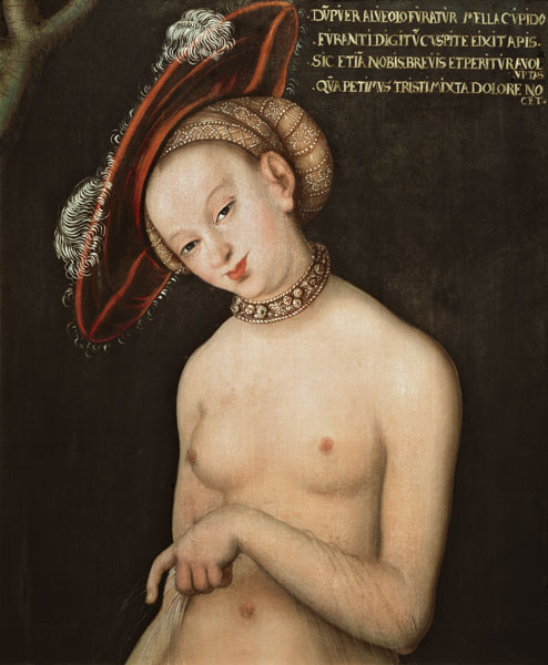 Venus (detail) by Lucas Cranach the Elder, Geneve, Musée d'Art et d'Histoire